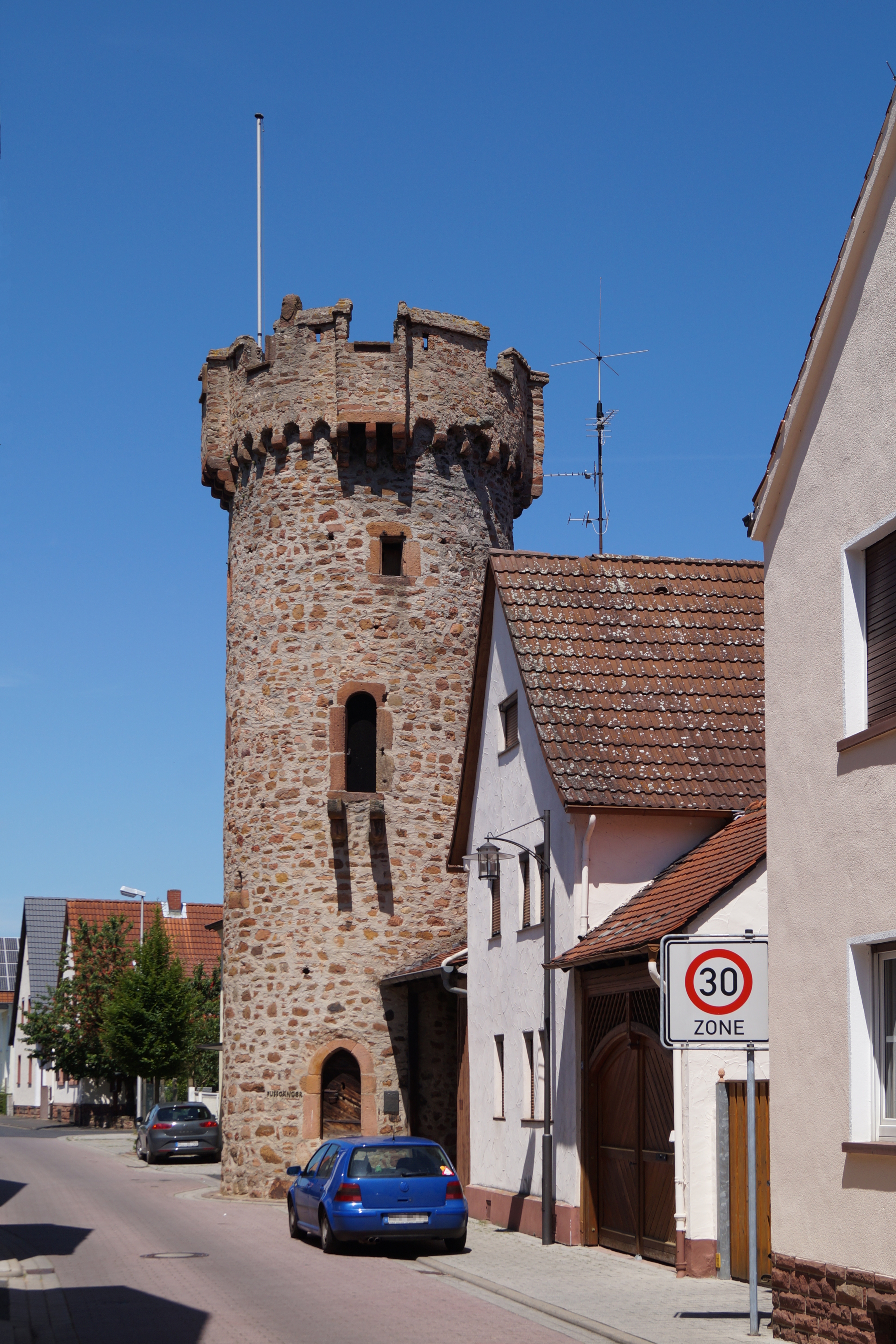 Runder Turm, erbaut 1460 als Teil der Ortsbefestigung von Großwallstadt.